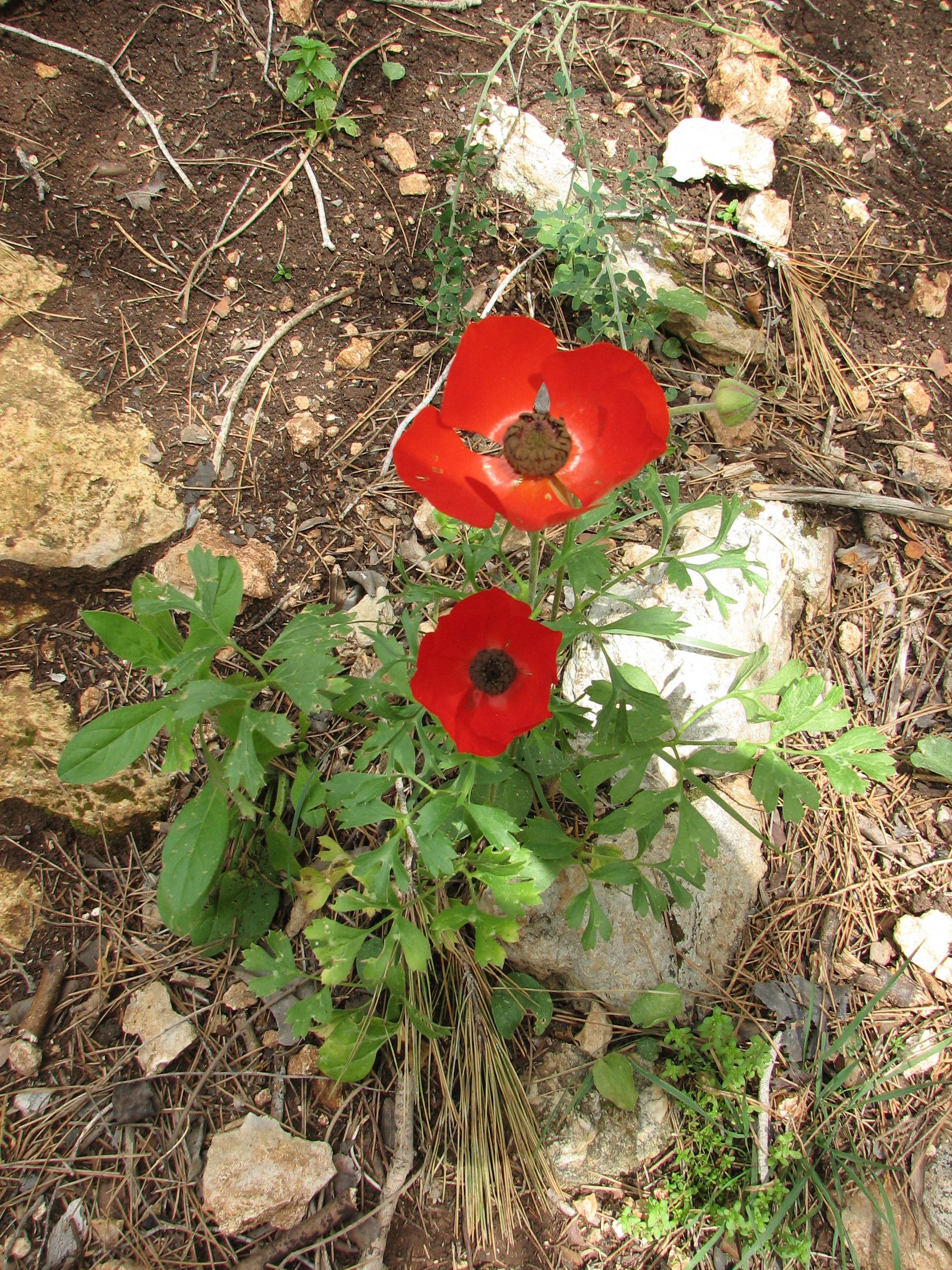 Park Nesher in the city Nesher on Mount Carmel, Israel. In the park there are 2 Suspension bridges, walking paths, Mediterranean forests, woodlands, scrub and flowers. A place for picnic, and playground. פארק נשר בעיר נשר ליד חיפה. הפארק שוכן בהר הכרמל. בפארק שני גשרים תלויים, חורש ים תיכוני, שפע פרחים, וחיות בר. בפארק אזור המיועד לפיקניק שולחנות וספסלים וכן מגרש משחקים לילדים. בואדי קטיע העובר בפארק מסלולי הליכה מסומנים העוברים בואדי ועל מורדותיו. ומערה פרהיסטורית. בפארק גם דרך העוברת על צלע ההר ישירות לגשרים, בה ניתן ללכת גם עם עגלות ילדים וכן ספסלי ישיבה ומרפסות תצפית. מהואדי ניתן לראות תצפיות על אוניברסיטת חיפה ועל שכונותיה של העיר נשר נורית